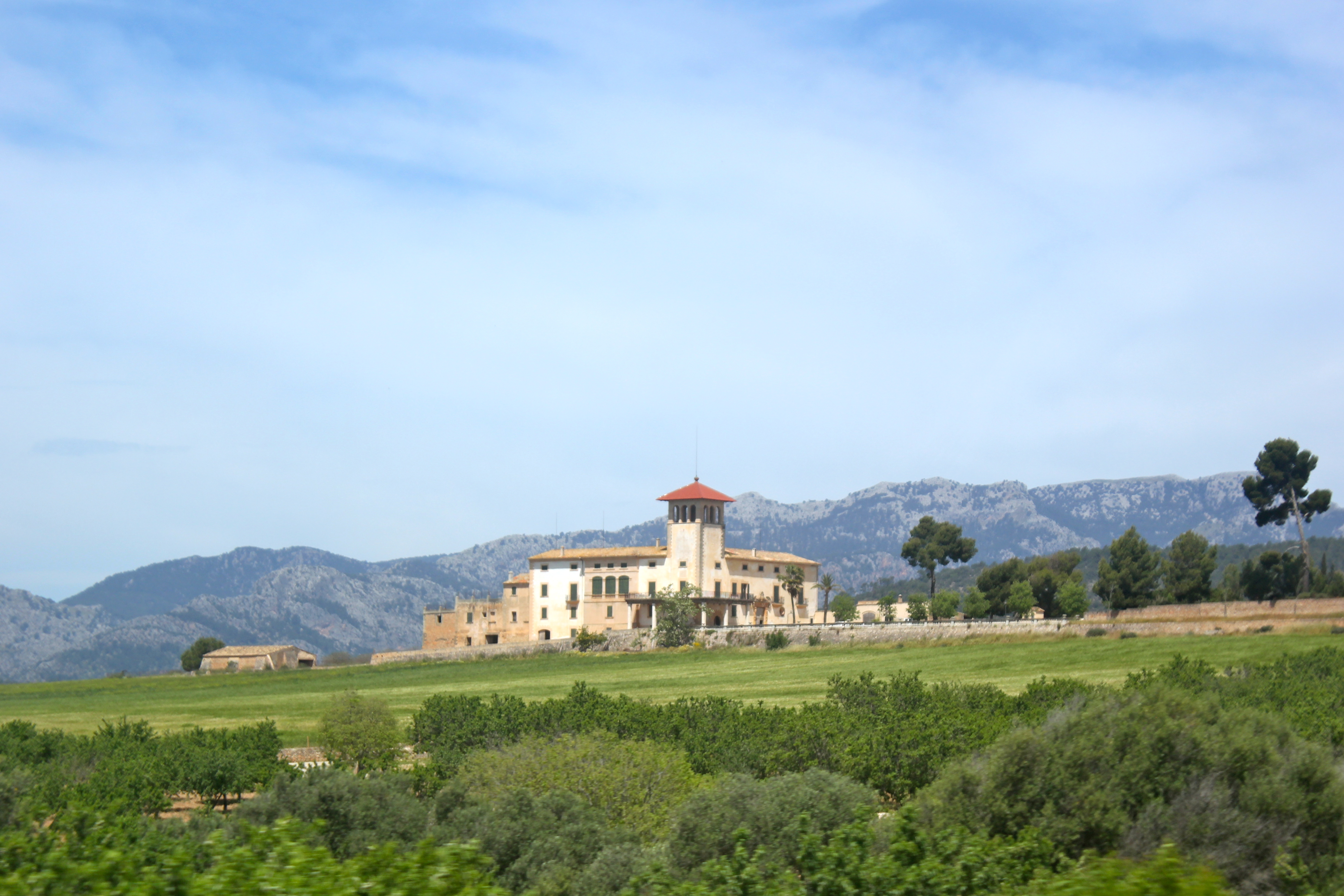 Son Sureda